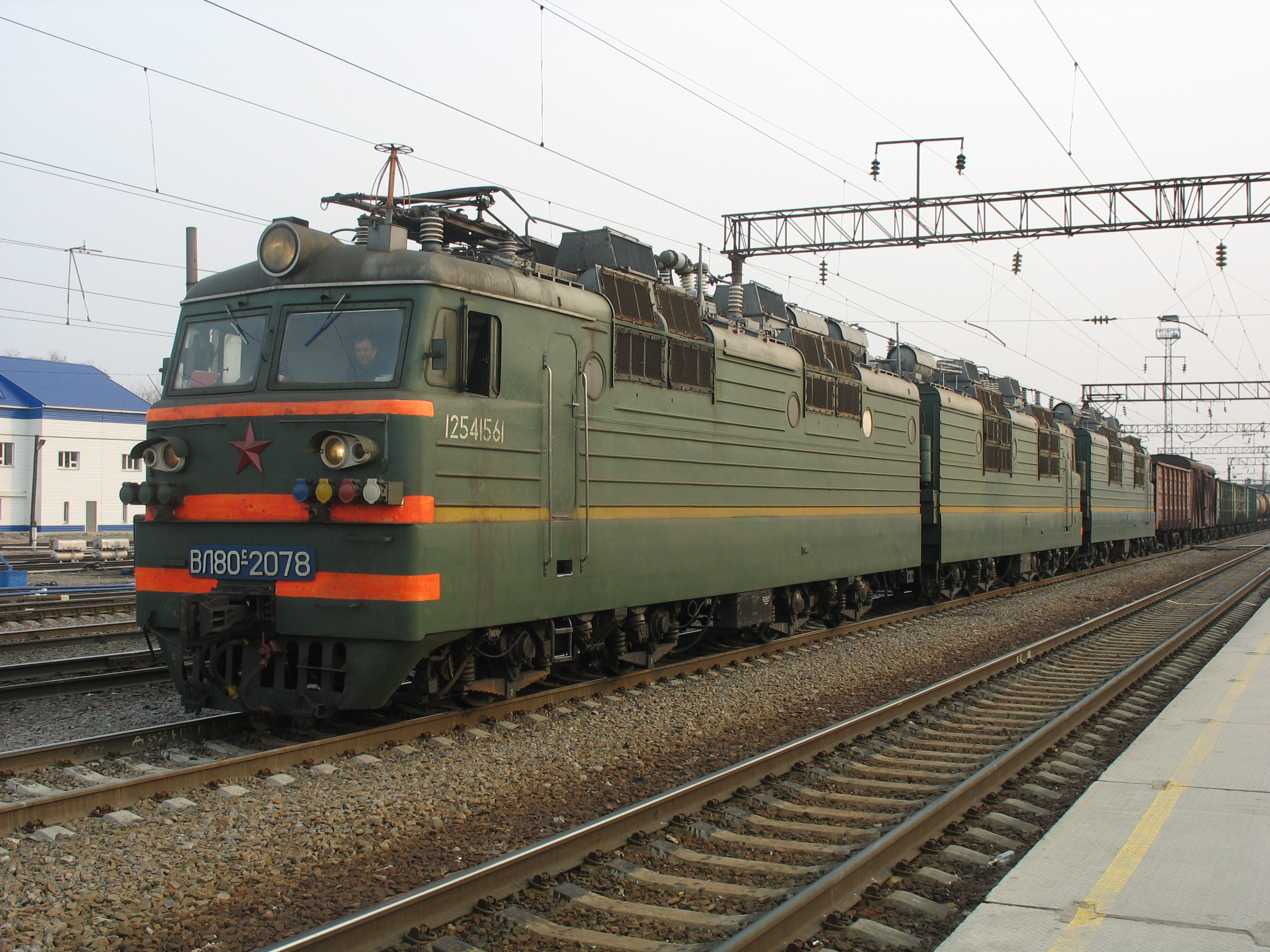 ВЛ80 на станции Придача